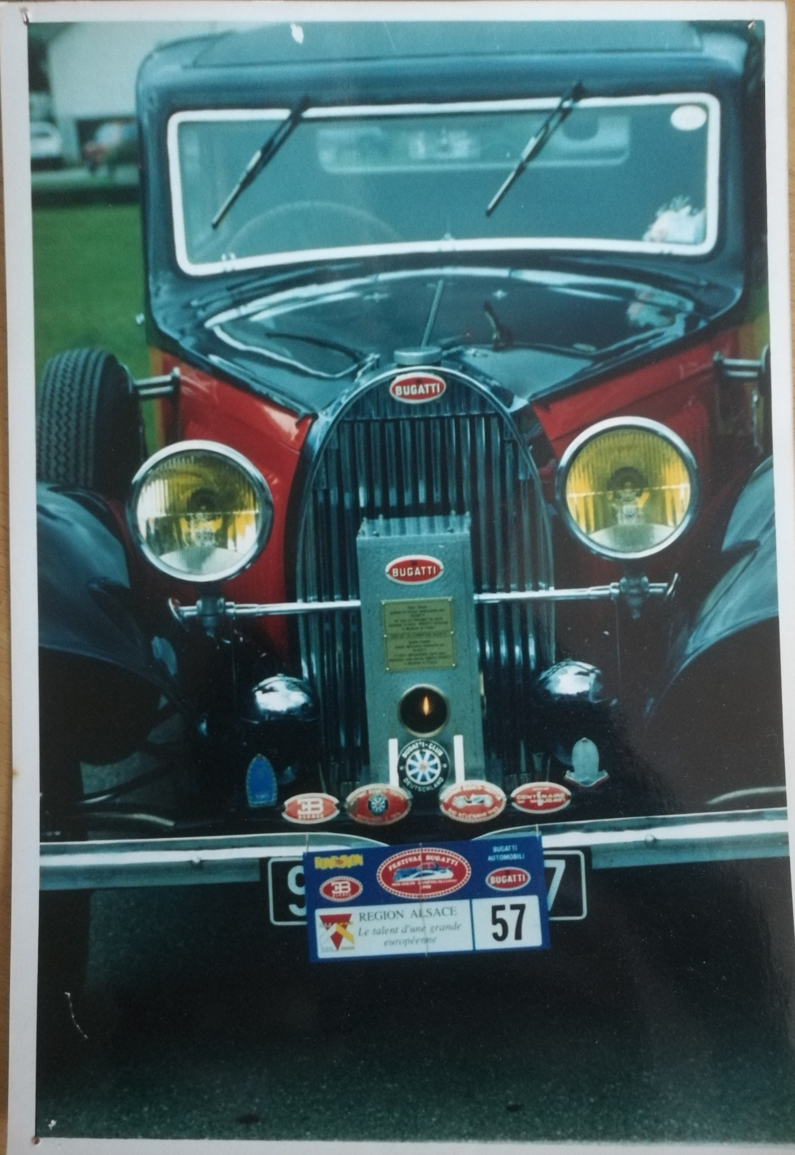 Bugatti T57 ayant appartenu à la famille Wagner